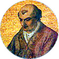 Papa Nicolaus II. (1010-1061)